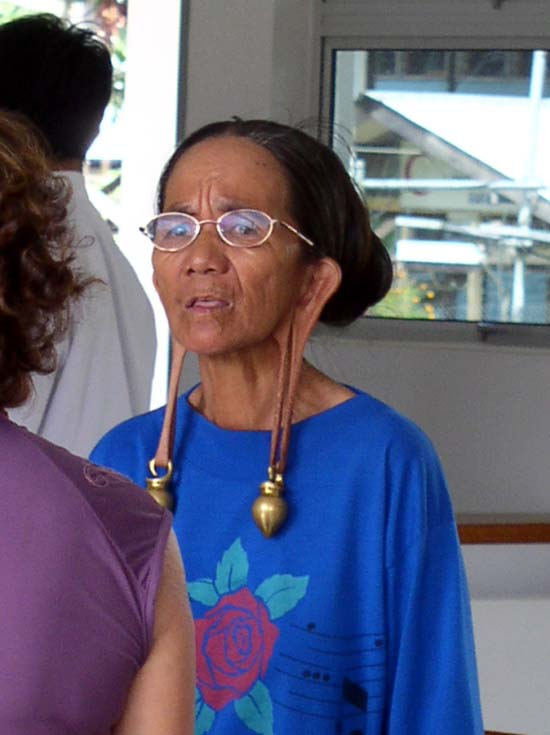 penan baram sarawak malaysia borneo